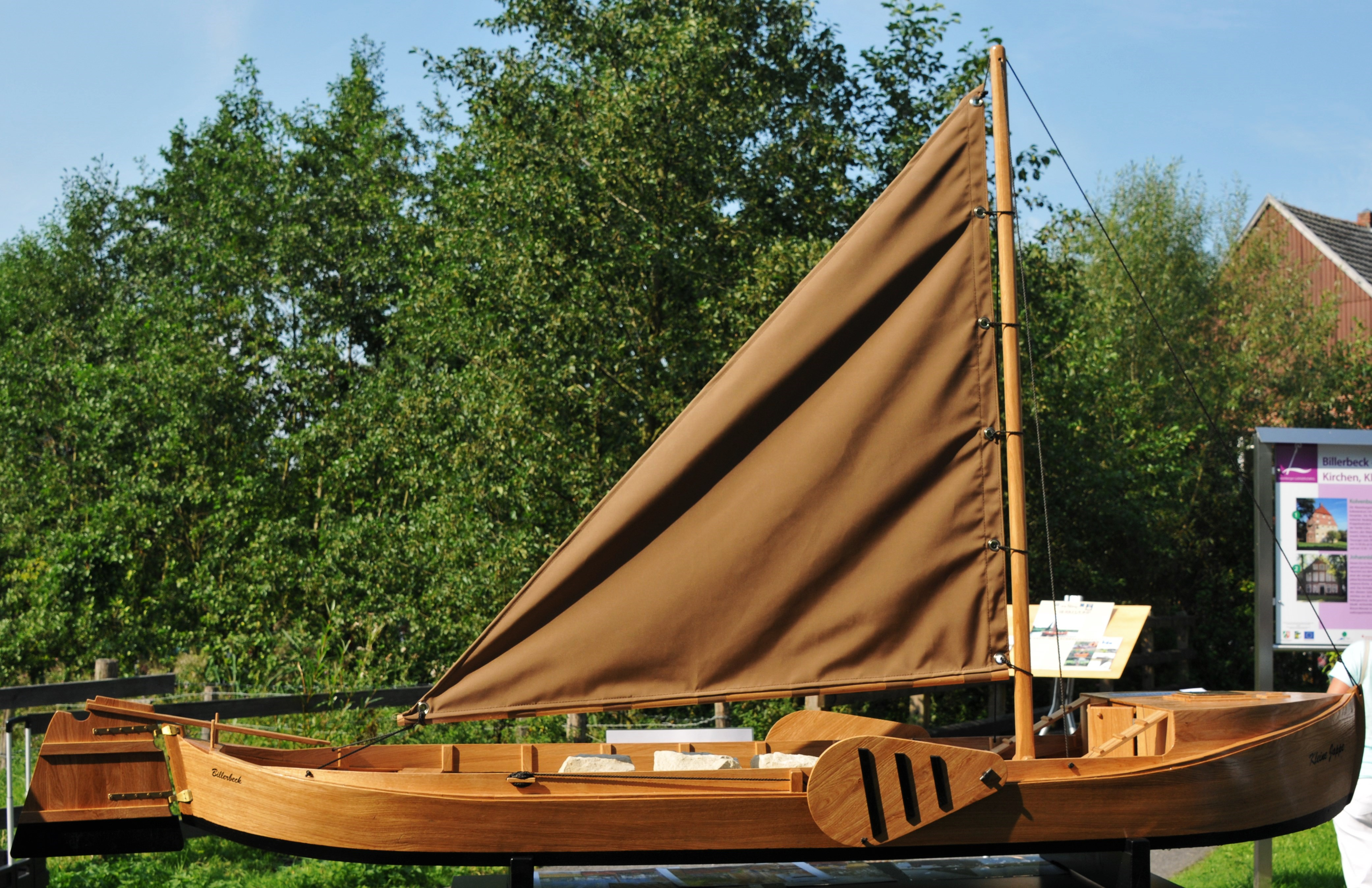 Als Kulturbotschafter der WWU begleitet die „Kleine Jappe“ die Einzelveranstaltungen der Kulturtraverse Berkel.